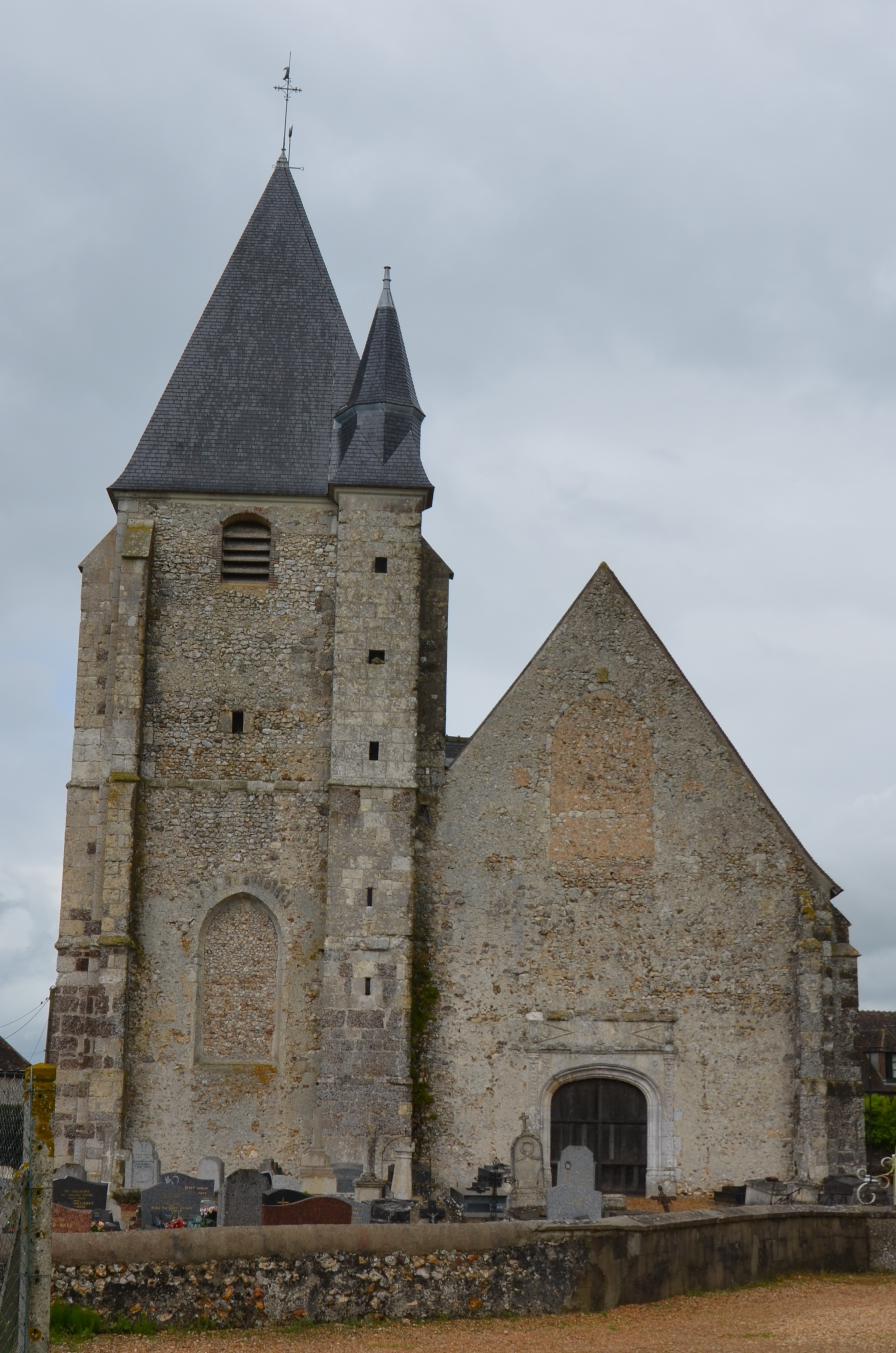 église Saint-Blaise de Gâtelles, Thimert-Gâtelles, Eure-et-Loir, France.